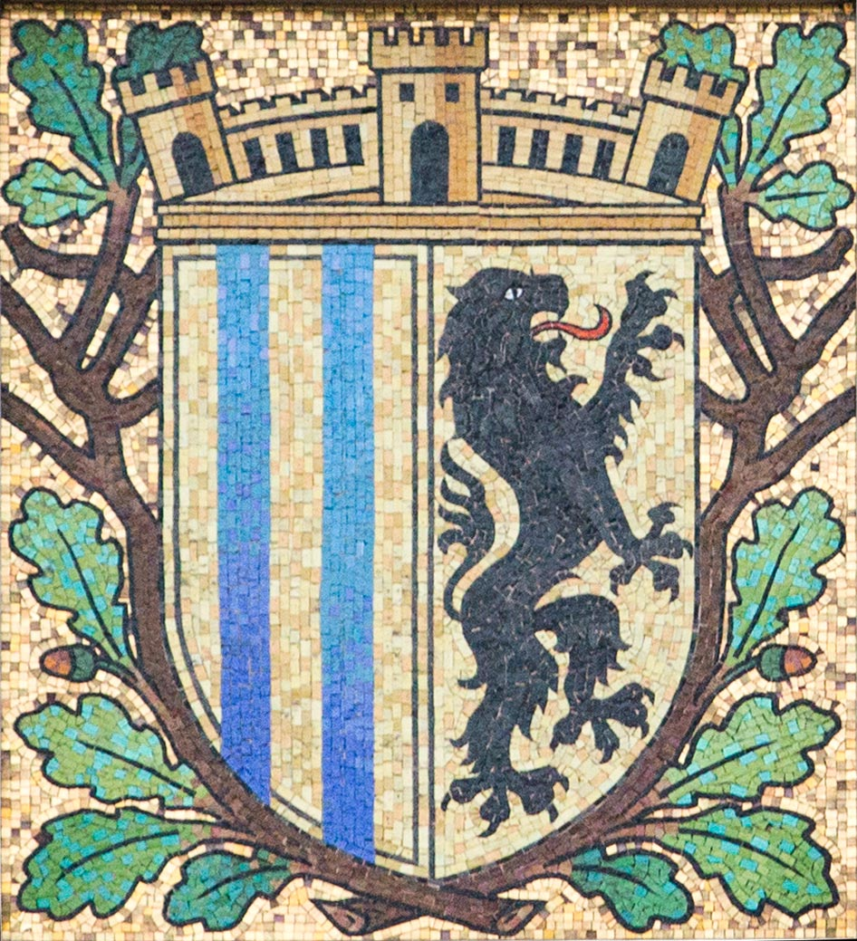 Altes Chemnitzer Wappen, wie es vor 1904 verwendet wurde. Es befindet sich an der ehemaligen Kaiserlichen Oberpostdirektion auf dem Chemnitzer Kaßberg.